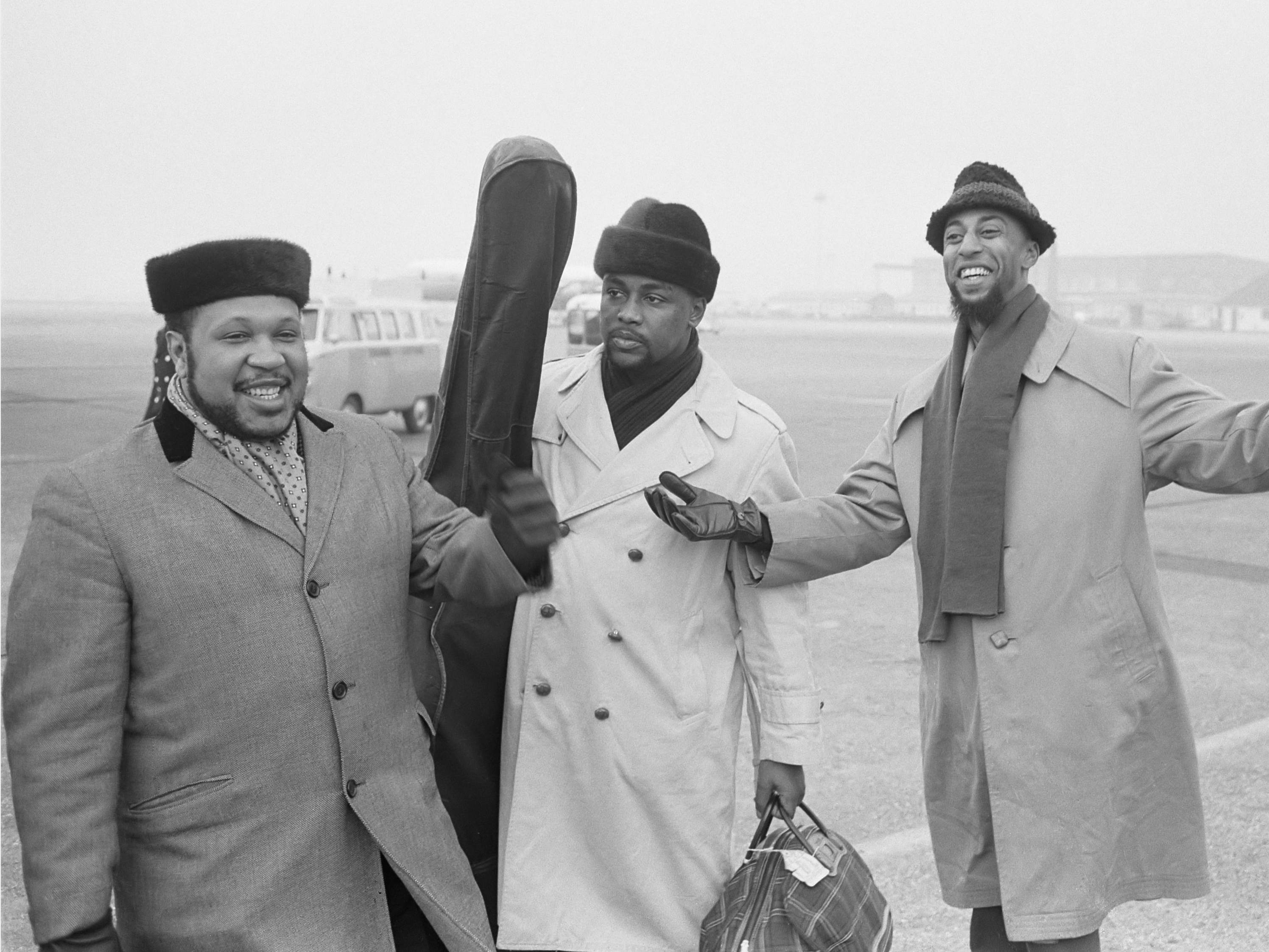 Het Less McCann trio op Schiphol, v.l.n.r. Less McCann (piano), Herbie Louis (bas) en Ron Jefferson (drums) 14 november 1962